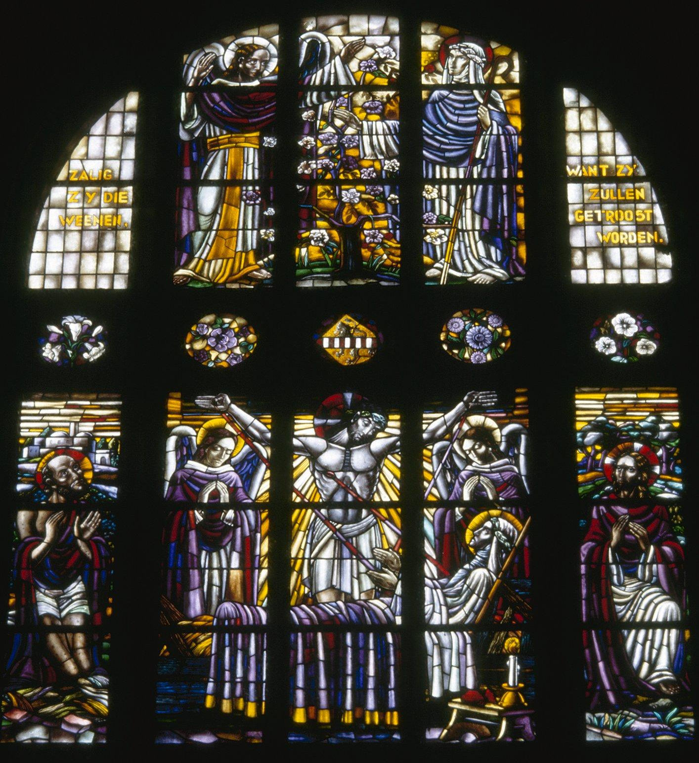 ROOMS-KATHOLIEKE KERK (SINT LAURENTIUSKERK): INTERIEUR, OVERZICHT GLAS IN LOODRAAM. Luduinaraam van Henk Asperslagh.